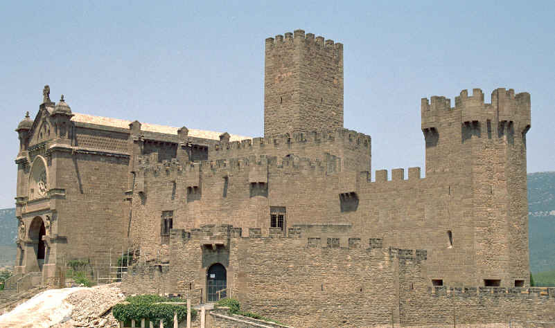 Burg Javier in der Provinz Navarra, Spanien.